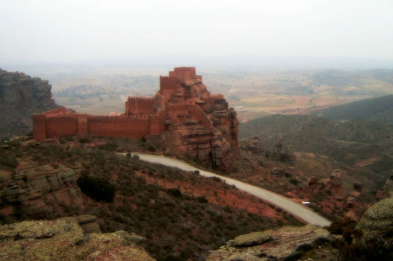 Castillo de Peracense